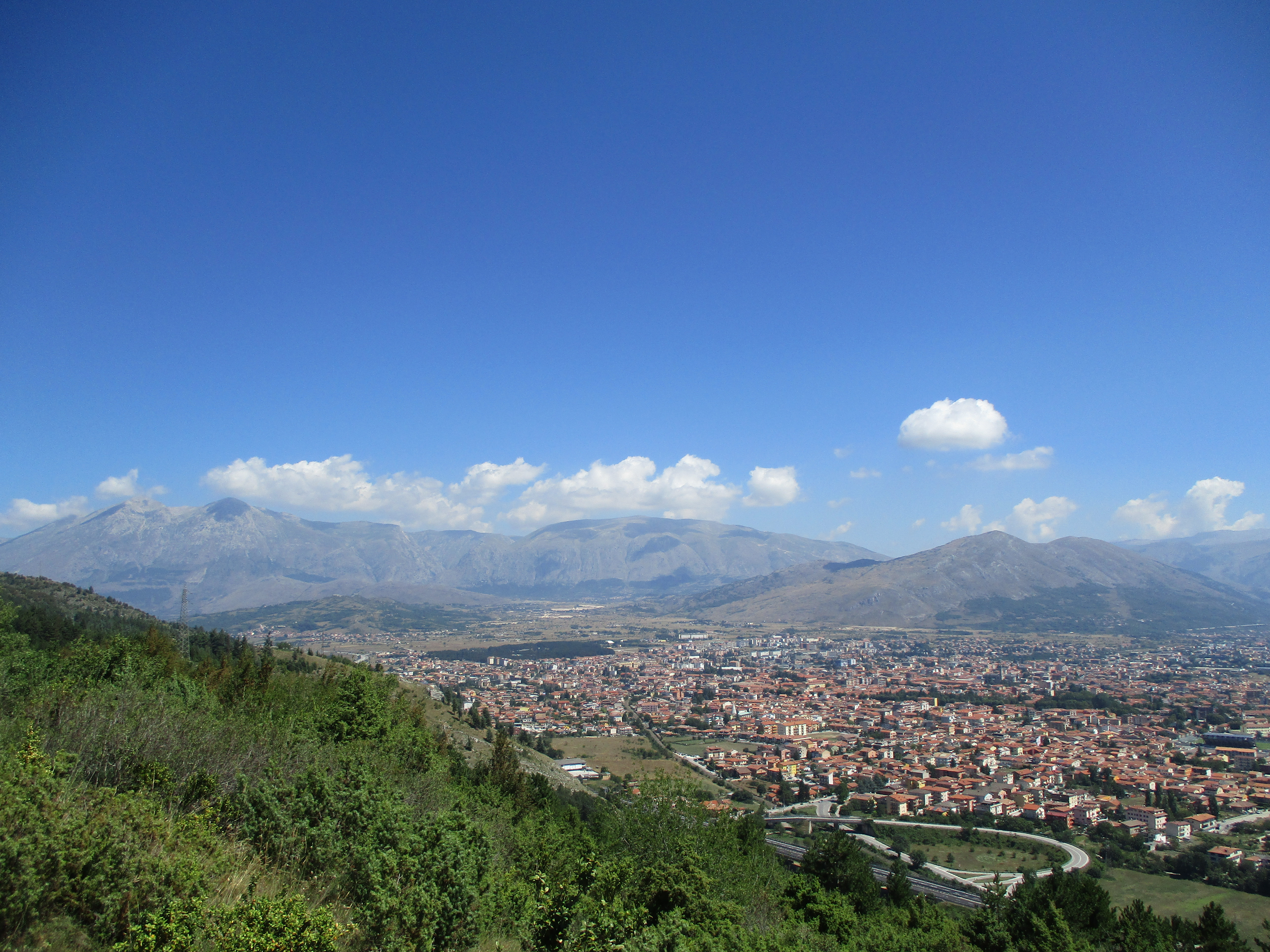 Panorama di Avezzano Categoria:Immagini di Avezzano